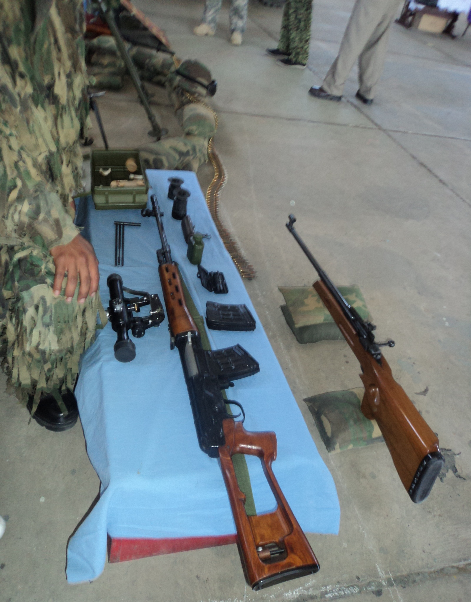 El famoso francotirador Dragunov